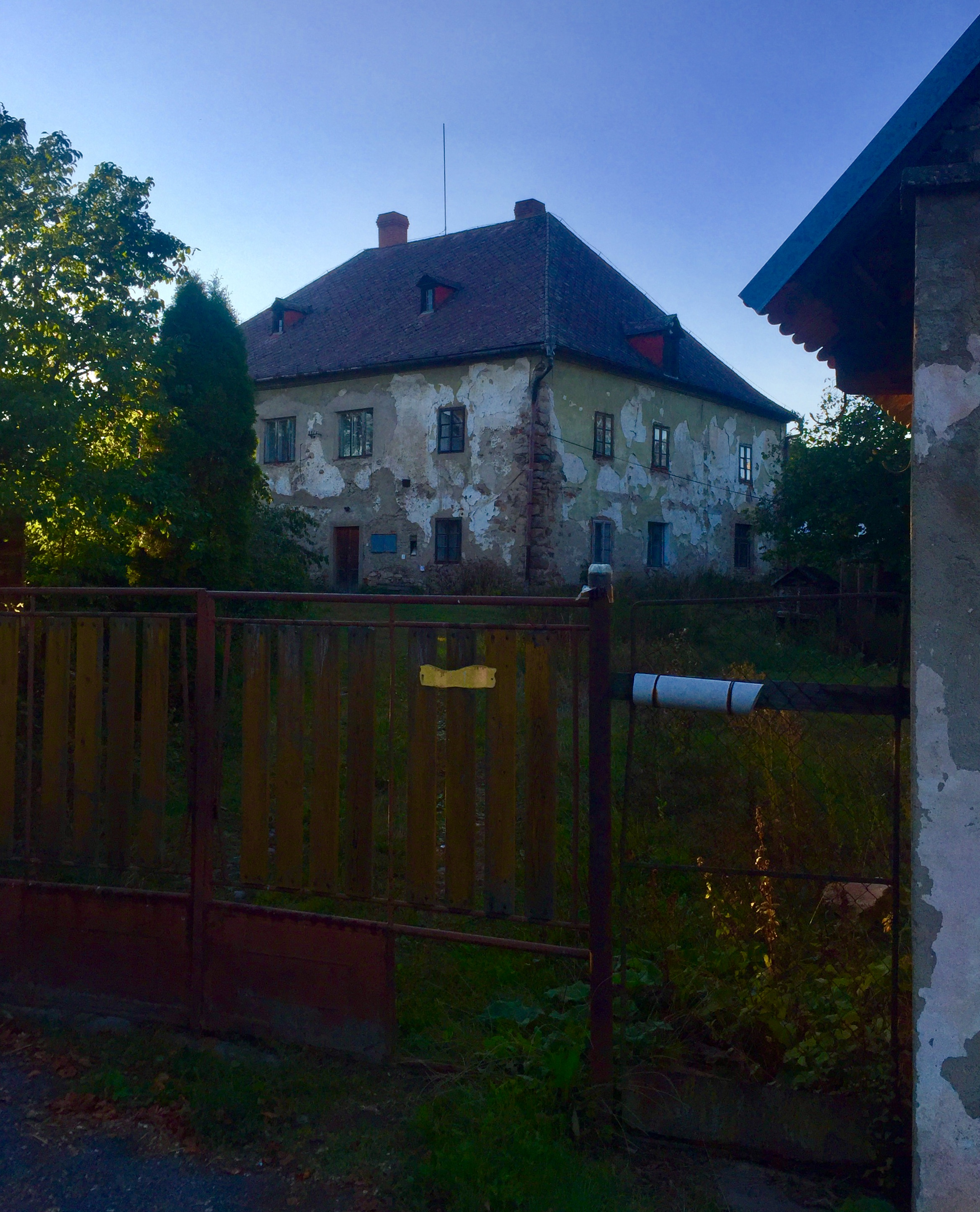 Renesančně - barokní budova fary (září 2018)